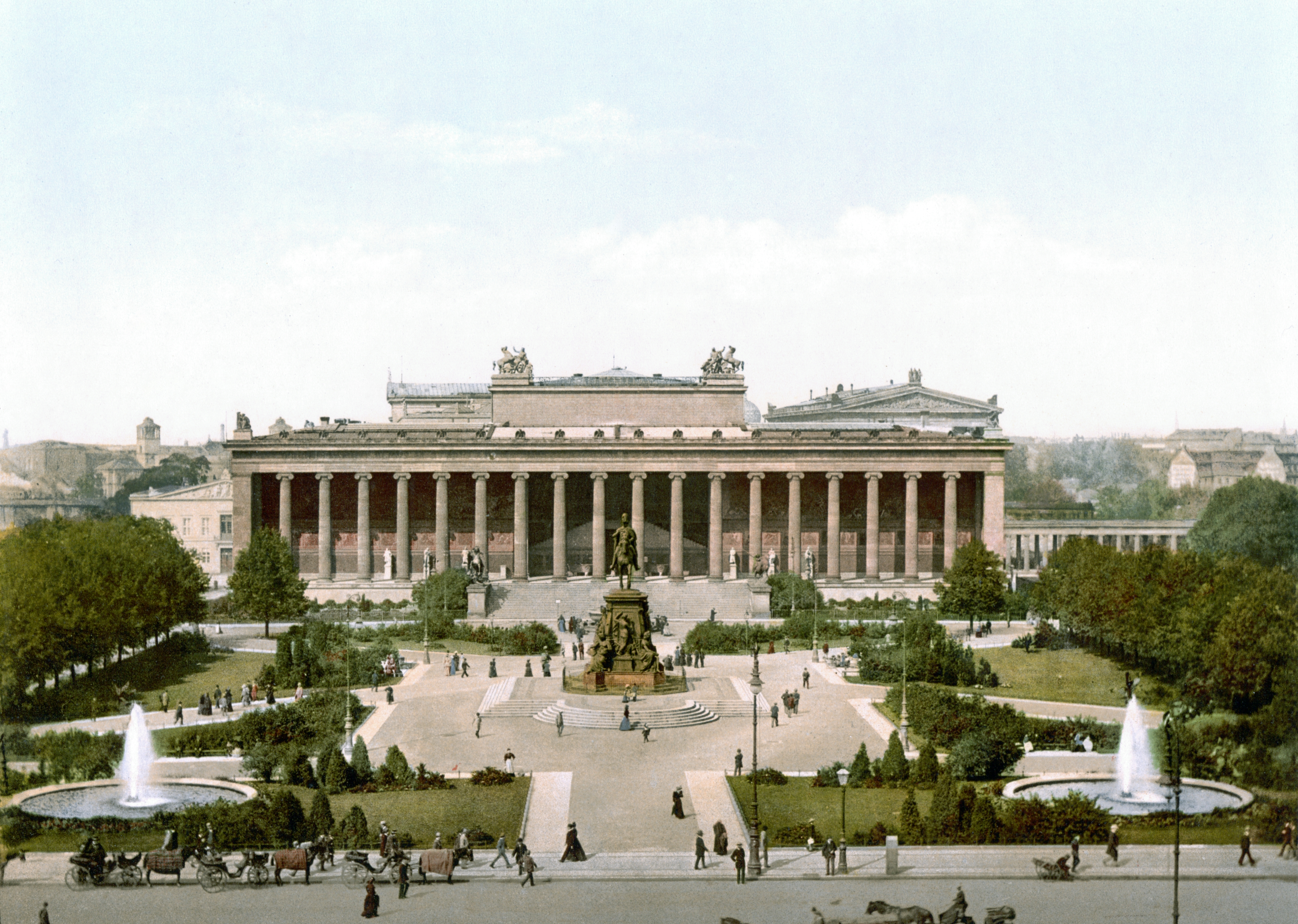 Altes Museum und Lustgarten zwischen 1890 und 1900